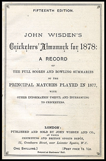 Wisden Cricketers' Almanac 1878